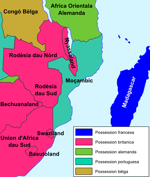 Moçambic en 1914.